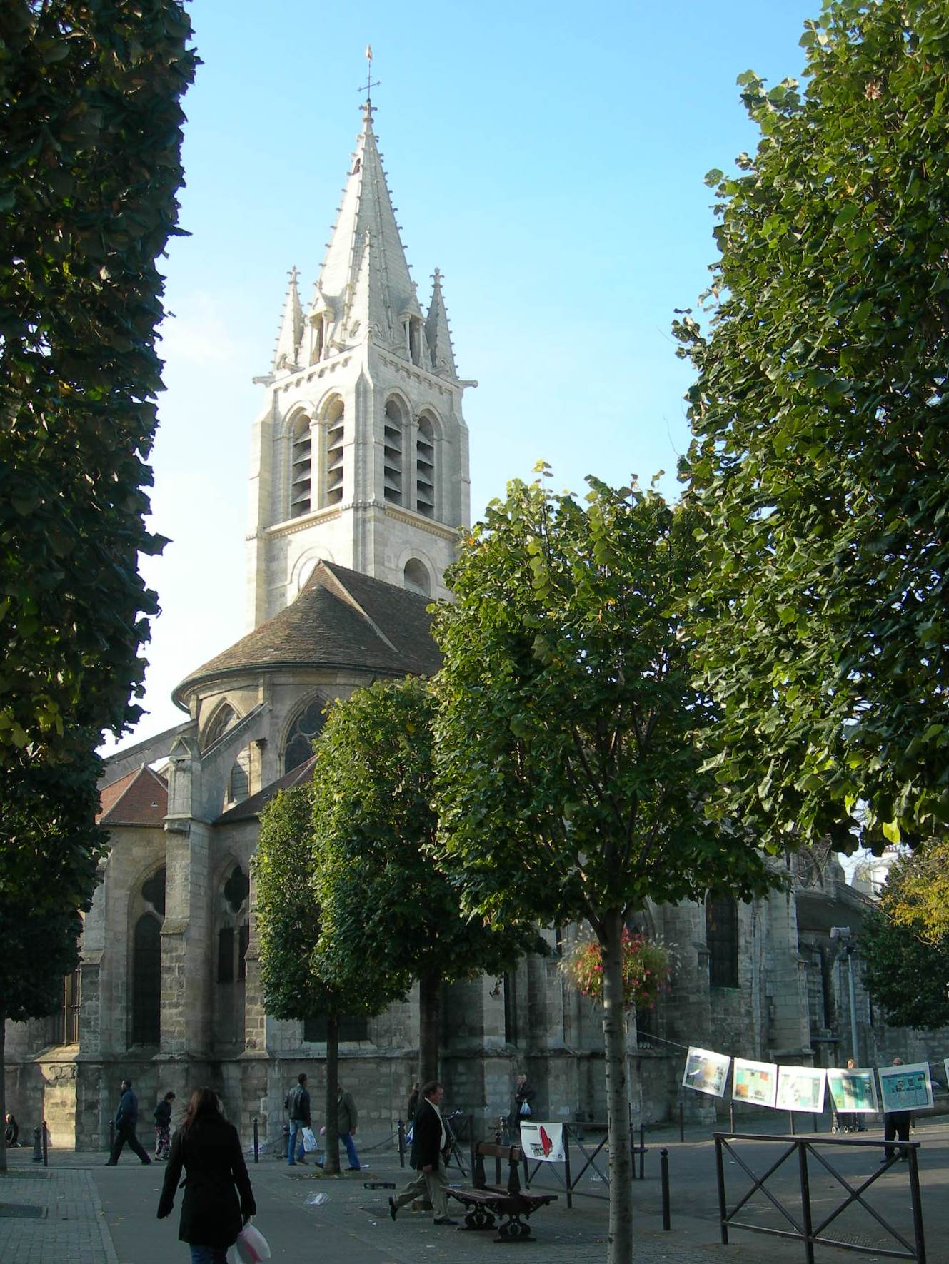 Vitry-sur-Seine (Val-de-Marne, France) : Vue NE de l'église Saint-Germain.